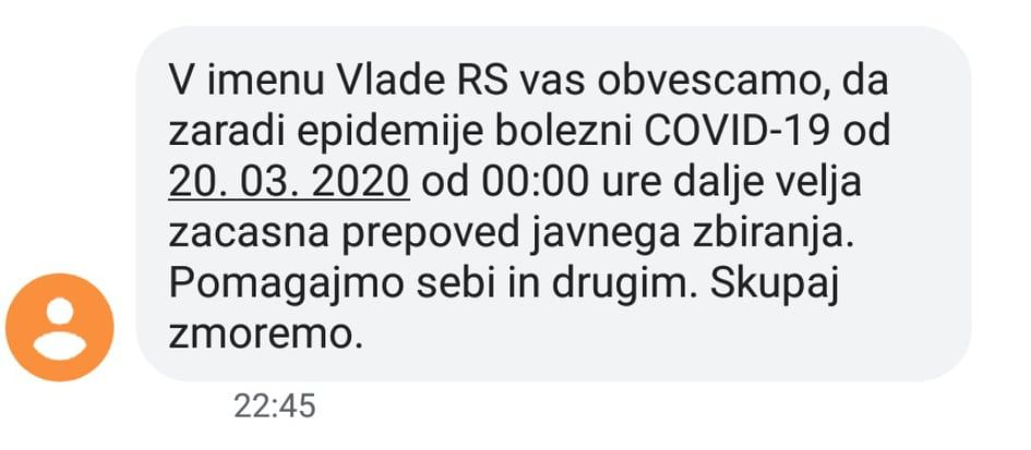 Tekstovno sporočilo, ki so ga prejeli uporabniki mobilnih storitev v Republiki Sloveniji 19. 3. 2020.